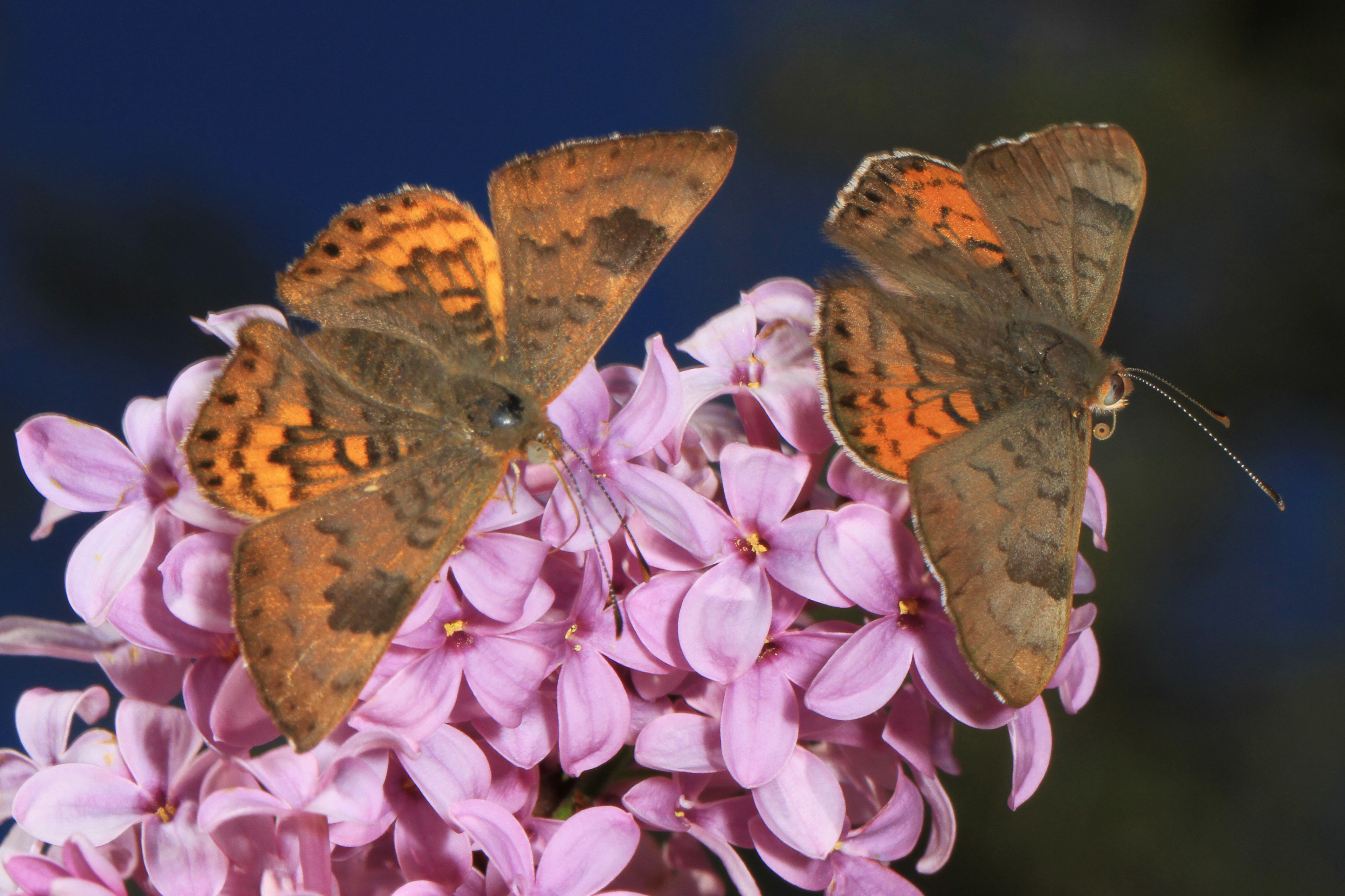 Zela Metalmark - Emesis zela, V-bar-V Ranch, Lake Montezuma, Arizona